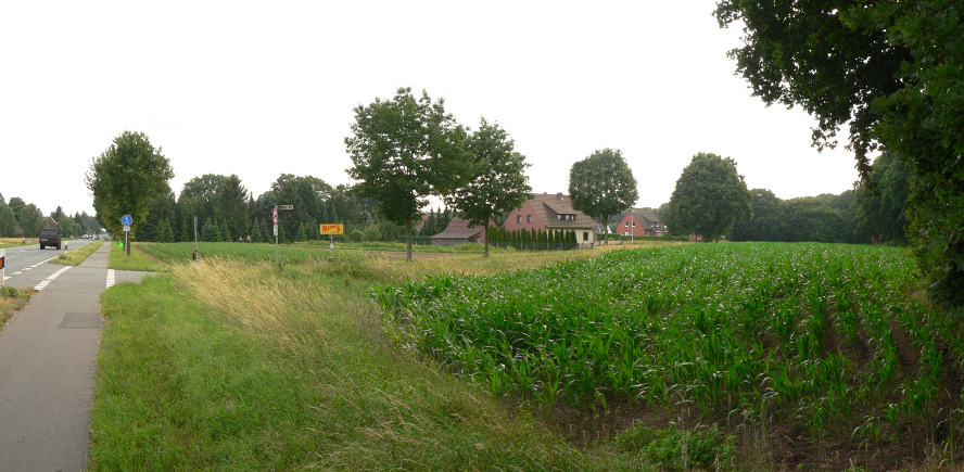 Mögliches Schlachtfeld 1547 im heutigen Drakenberger Ortsteil Sandberge, links die B 215, rechts Schwarzer Weg